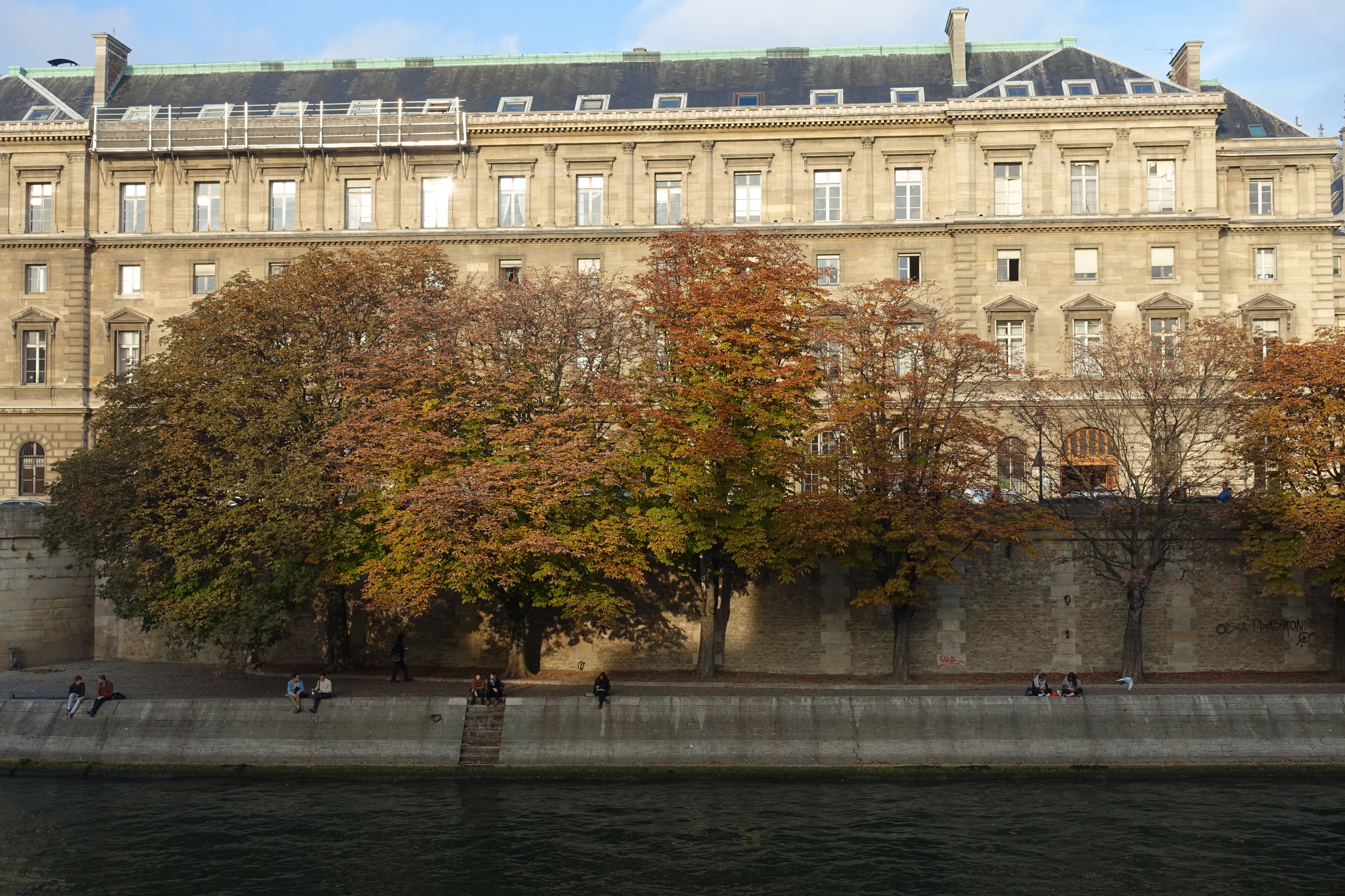 Ile de la Cité @ Seine @ Paris